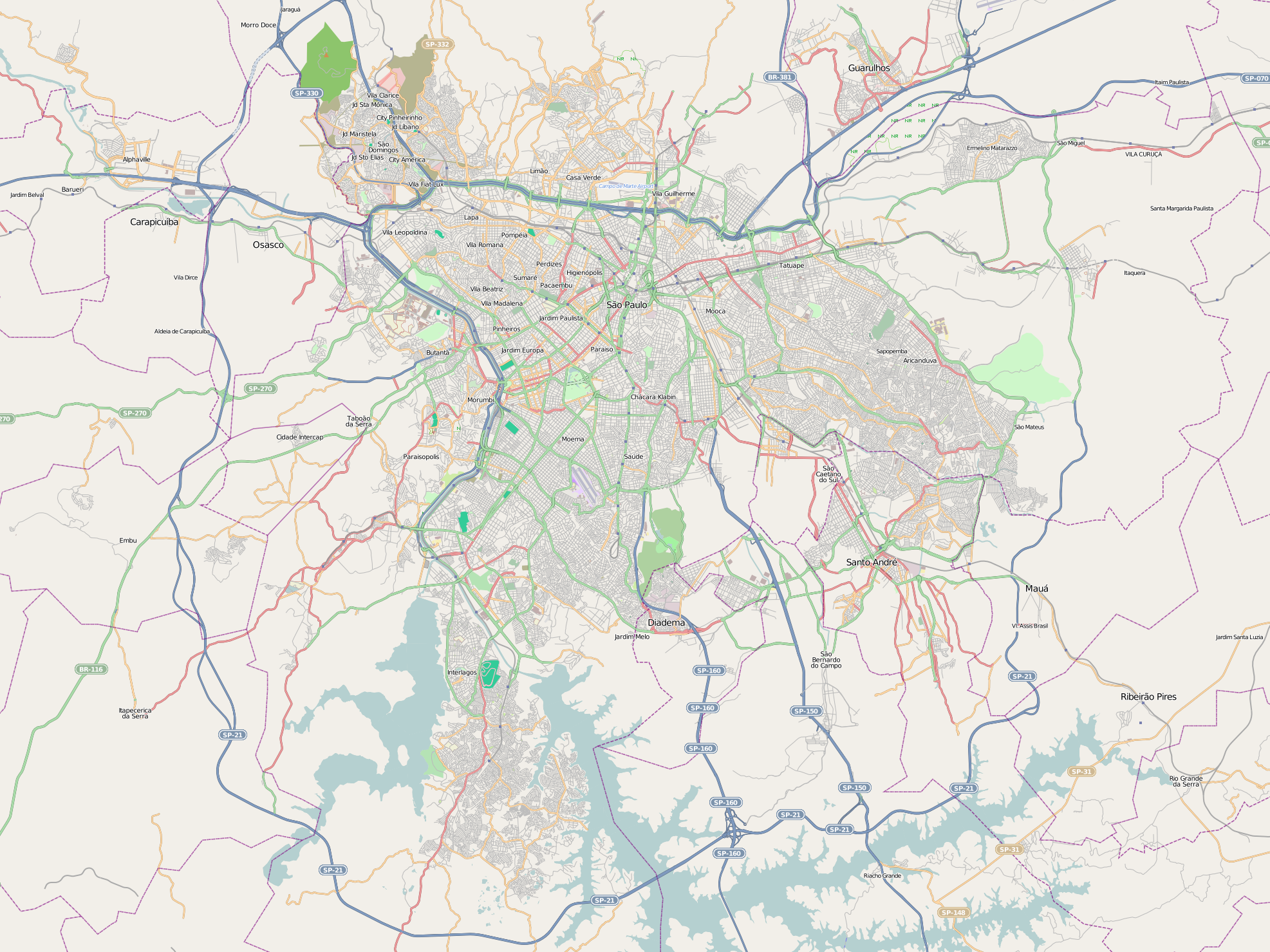 Mapa da Grande São Paulo, Brasil. This map may be incomplete, and may contain errors. Don't rely solely on it for navigation.